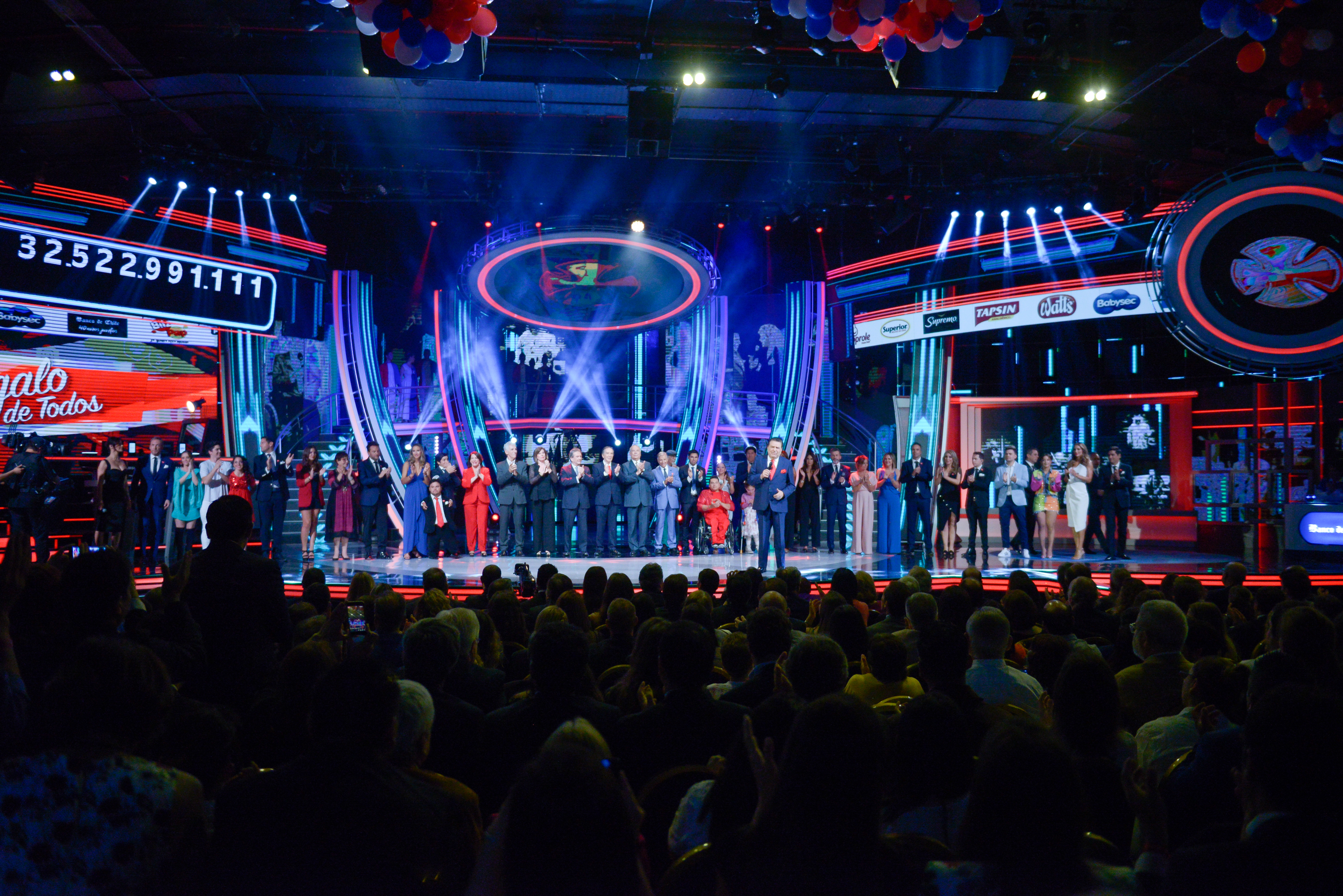 Ministra Cecilia Pérez asiste a la Teletón